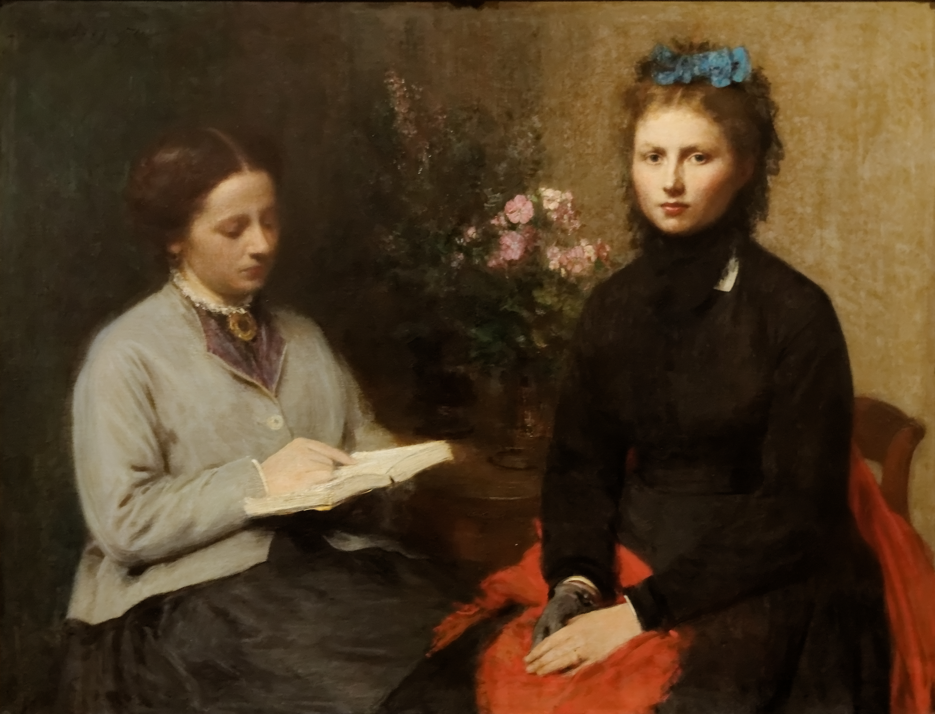 La lecture, Henri Fantin-Latour , France 1870. Huile sur toile exposée au musée Calouste Gulbenkian, Lisbonne. Inv 257